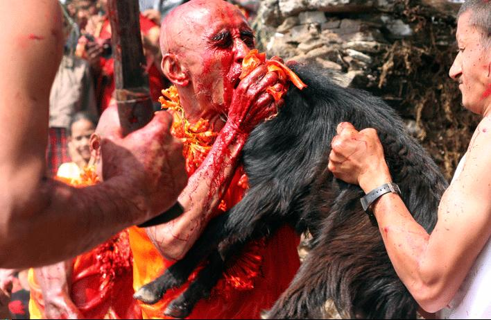 नेपाली: Masto Puja Maa Boka Bali